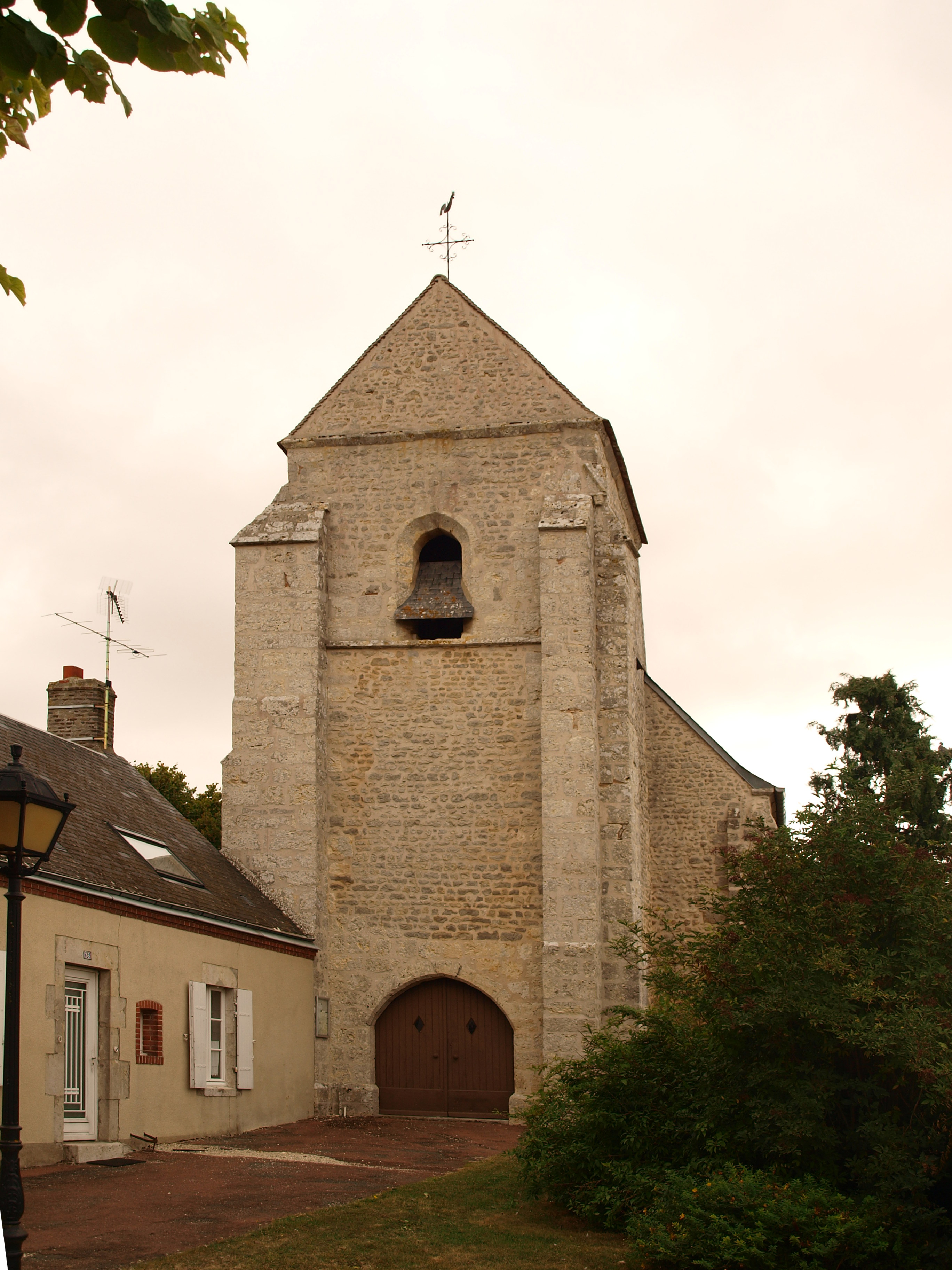 Saint-Cloud-en-Dunois (Eure-et-Loir, France) ; église